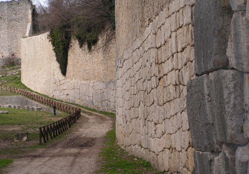 R.Passagrilli - Amelia Mura Poligonali - scorcio lato SO